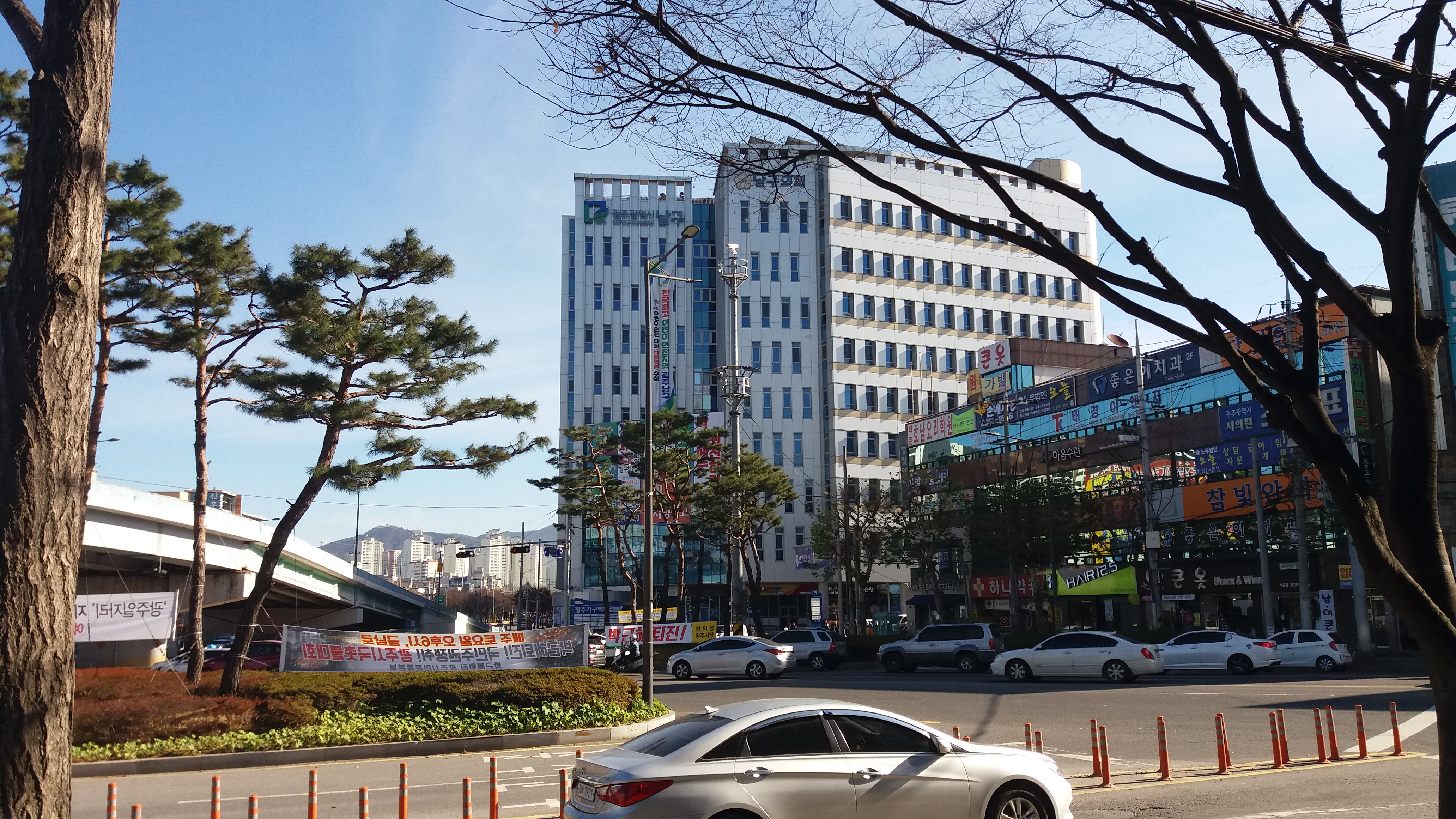 광주 남구청, 백운 교차로 (대남대로, 서문대로)